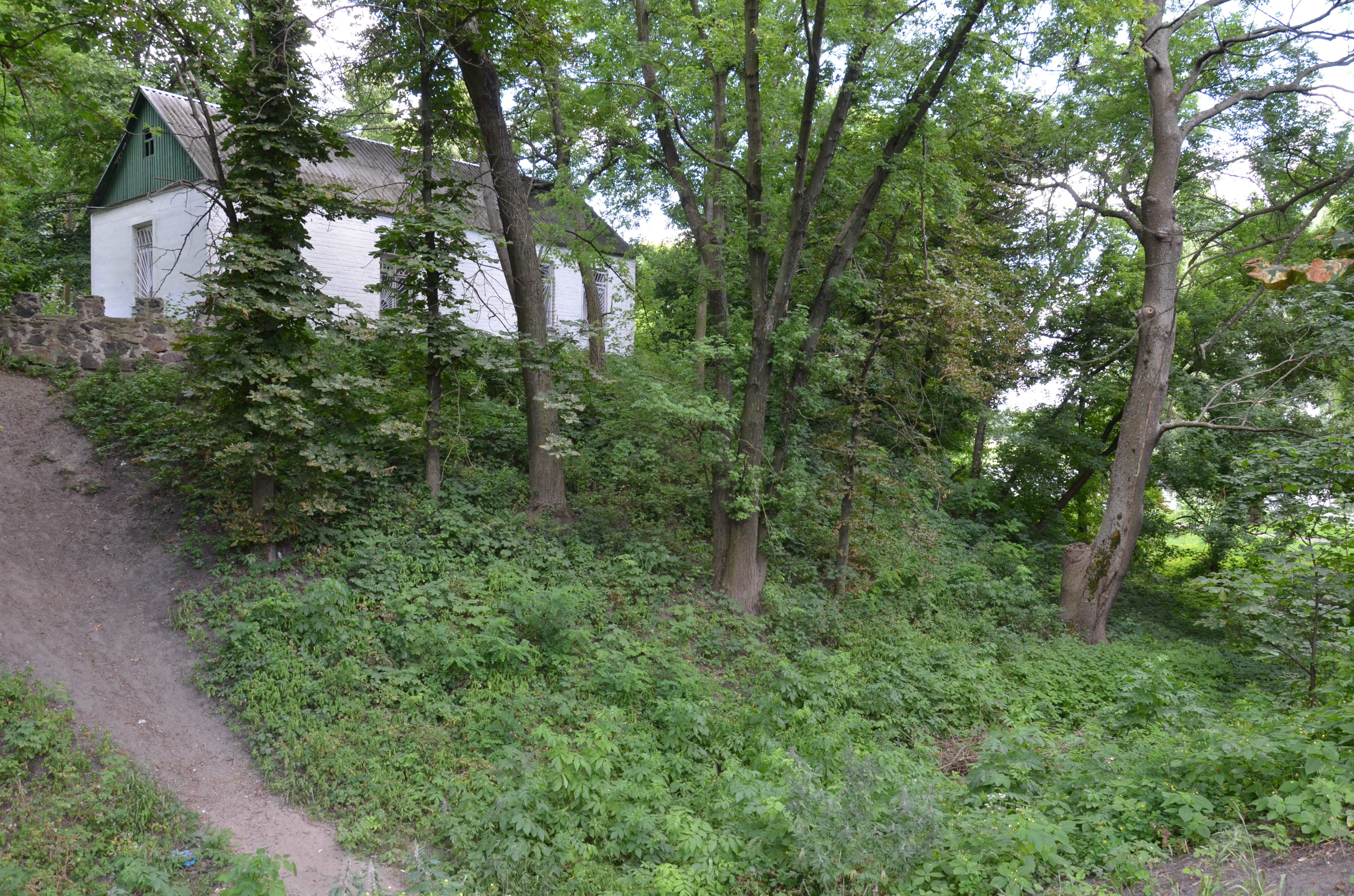 Городище і селище, Макарів, на мисі лівого берега р. Здвиж, на території смт; селище — на території стадіону, у парку